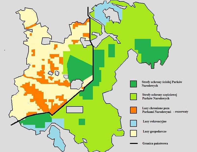 Ochrona i sposób zagospodarowania lasów w polskiej i białoruskiej części Puszczy Bialowieskiej. Uproszczony schemat, z pominięciem miedzy innymi terenów mniejszych miejscowosci. Opracowano na podstawie mapy zawartej w artykule Gutowski J., Jaroszewicz B.. Puszcza Białowieska jako ostoja europejskiej fauny owadów. „Wiadomości Entomologiczne”. 23 Supl. 2, s. 67-87, 2004. Poznań: Polskie Towarzystwo Entomologiczne.